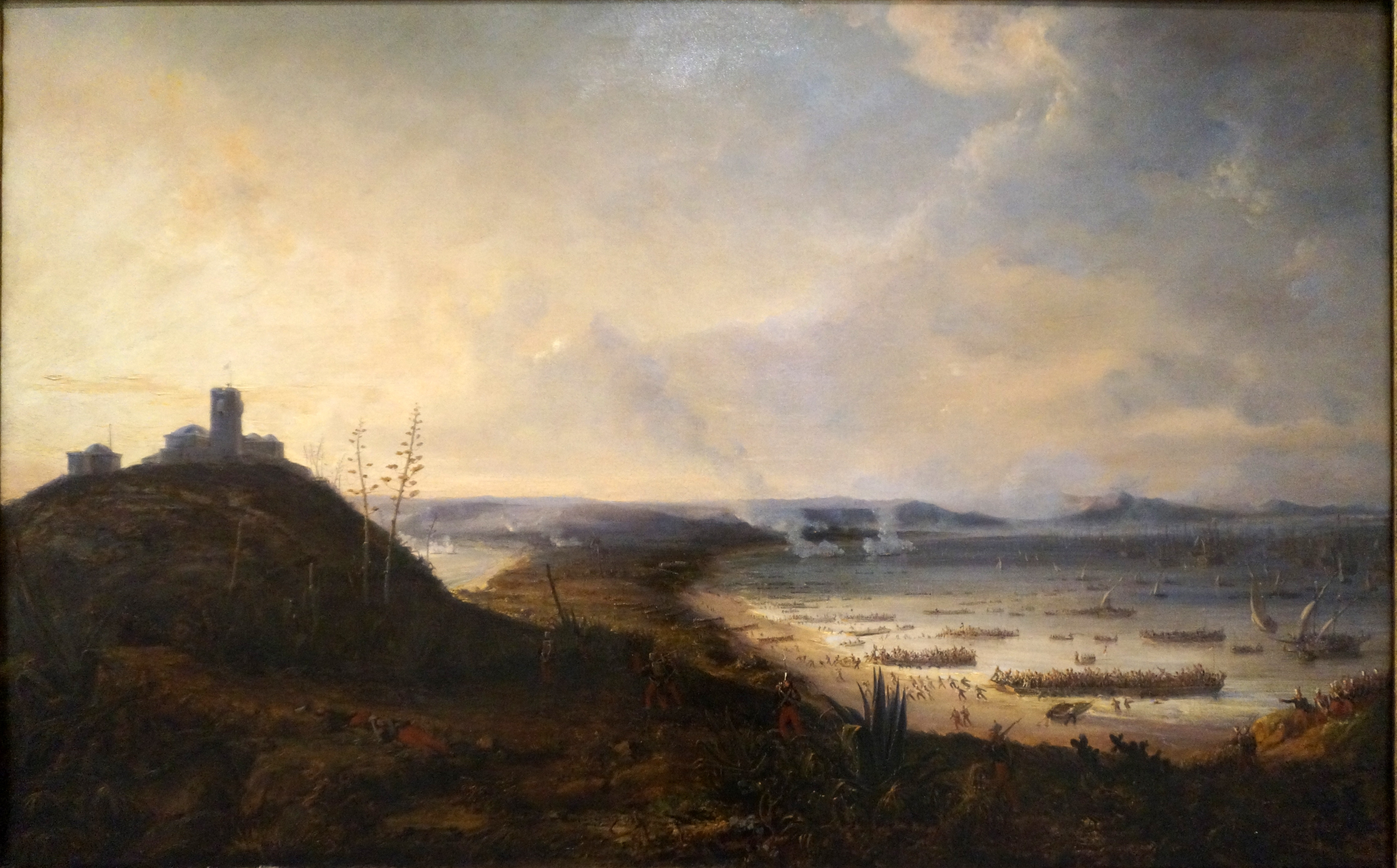 Peinture : le débarquement à Sidi-Feruch.